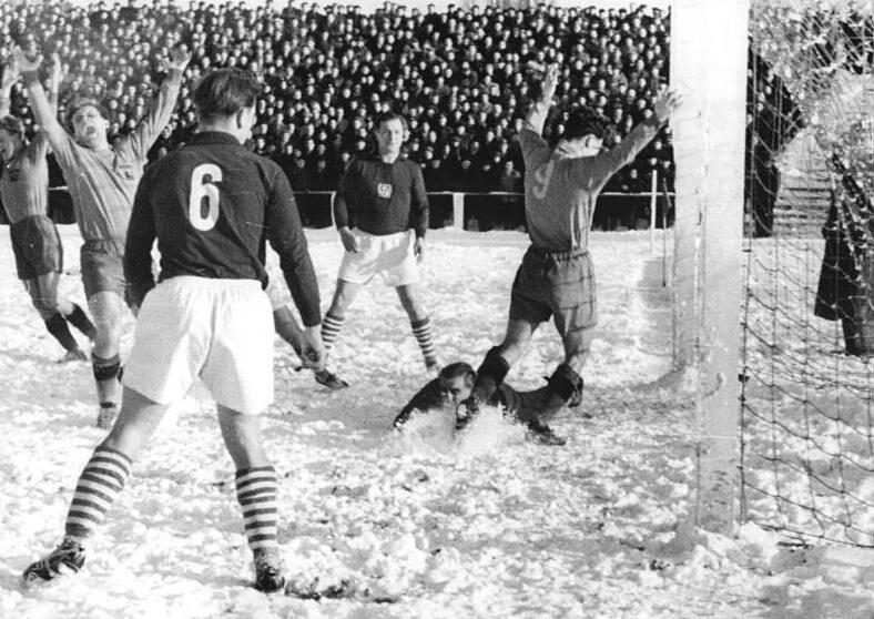 Zentralbild-Leipzig-Dittrich Dr-Ho. 17.12.1957 Vorschlussrunde um den FDGB Pokal - In der Vorschlussrunde um den FDGB Pokal siegte SC Lok Leipzig über den SC Dynamo Berlin mit 2:1. UBz: Bereits in den ersten Minuten brachte Konzak mit der Nr. 9 seine Mannschaft in Führung. Von links mit erhobenen Armen: Behne, Fröhlich (beide Lokomotive) und Scheffler (Dynamo). Am Boden liegt Vormann Klemm.